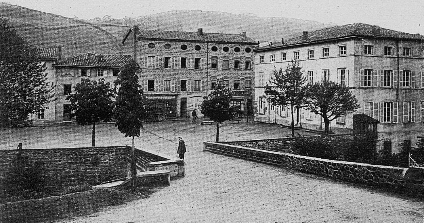 Dictionnaire illustré des communes du département du Rhône. Tome 1 / par MM. E. de Rolland et D. Clouzet.